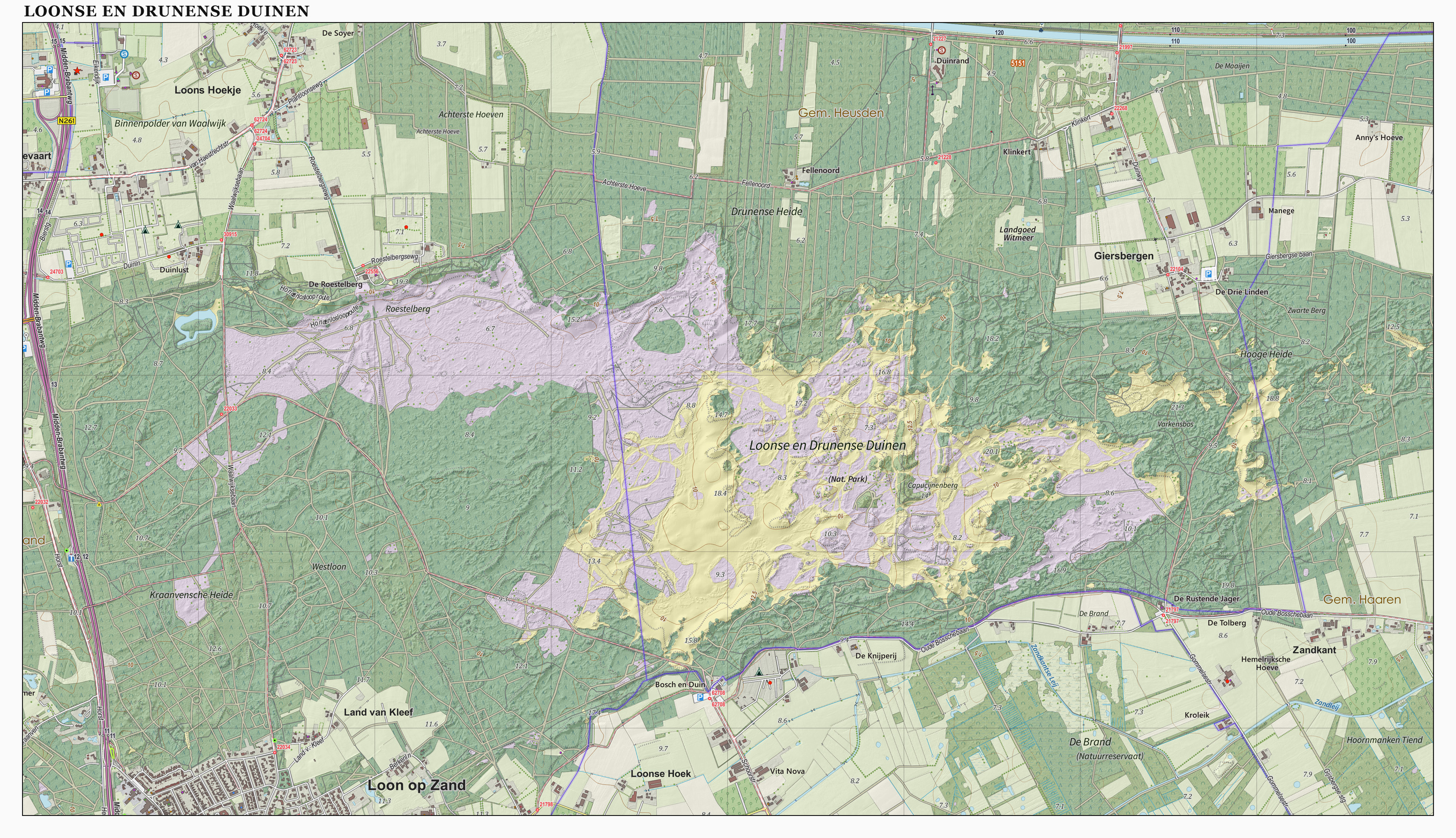 Topografische kaart van de Loonse en Drunense Duinen (natuurgebied). Resolutie: 400 pixels/km. Samengesteld door Jan-Willem van Aalst op basis van de GML open geodata van de BRT/Top10NL (basisregistratie Topografie, Kadaster), vrijgegeven door Kadaster onder de Creative Commons BY licentie. Additionele gegevens uit BAG uit de Open Street Map en uit de Risicokaart. Zie ook de Legenda.